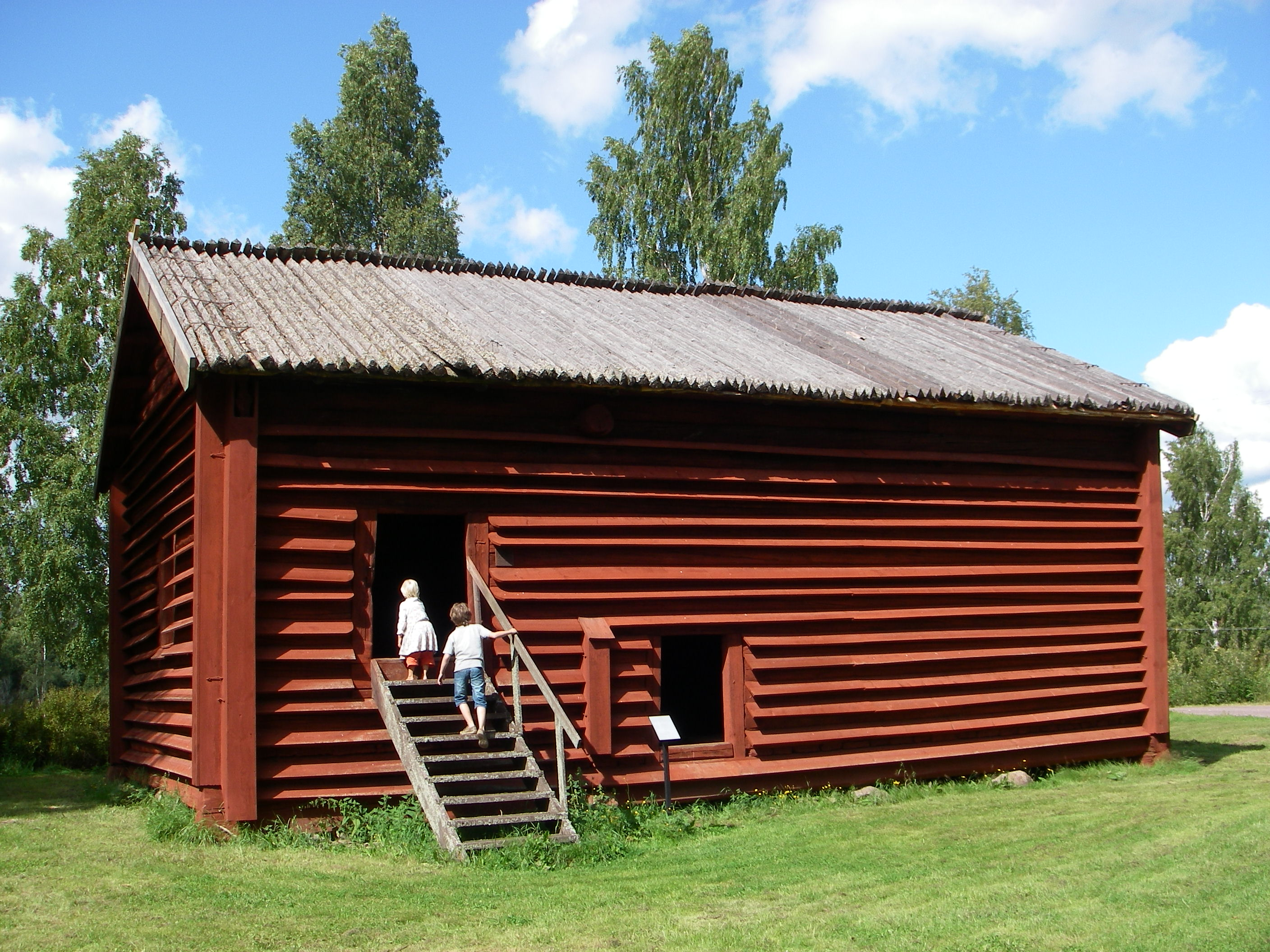 Kungsladan i Rankhyttan, Dalarna